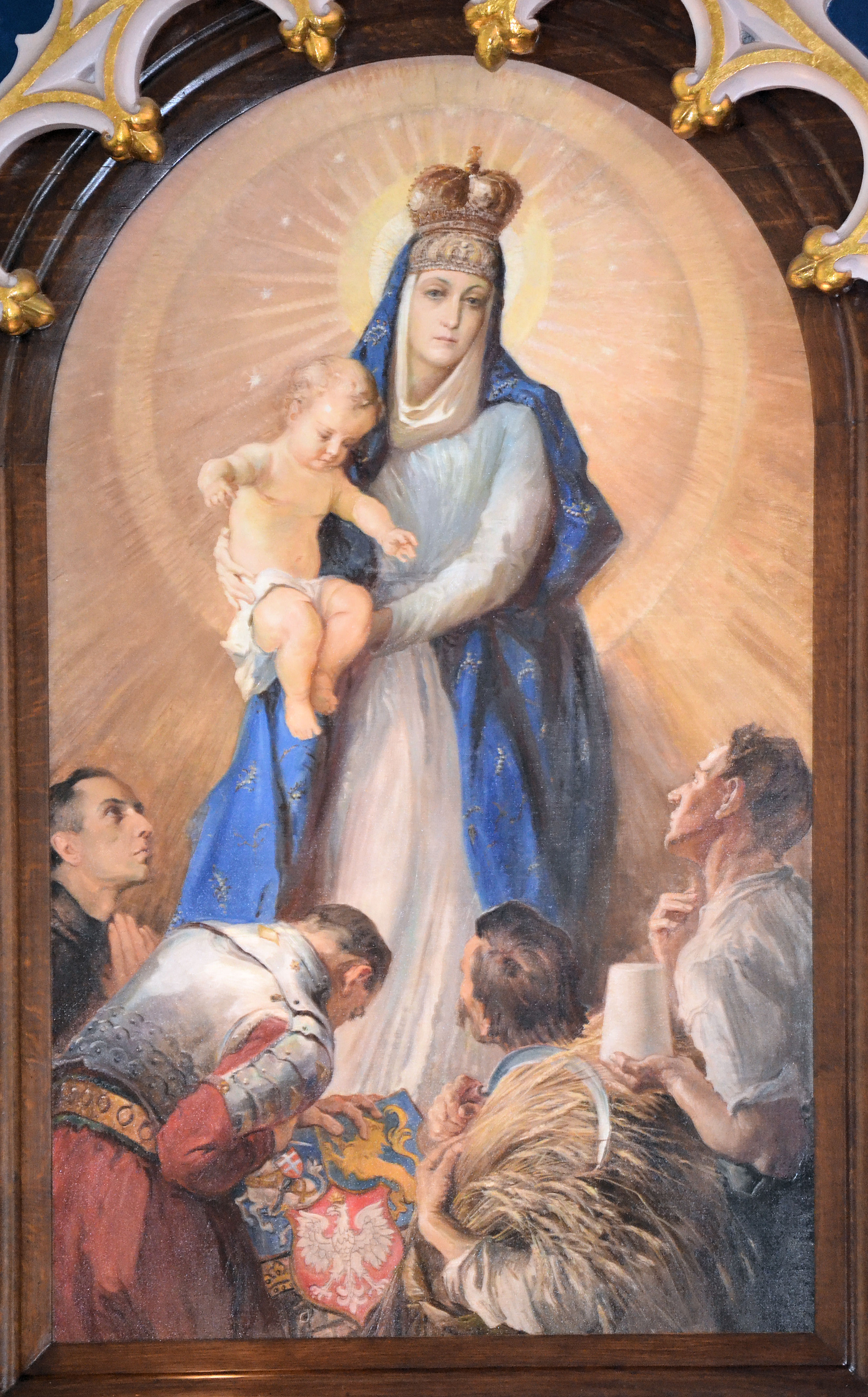 Kościół Narodzenia Najświętszej Maryi Panny w Gryfinie